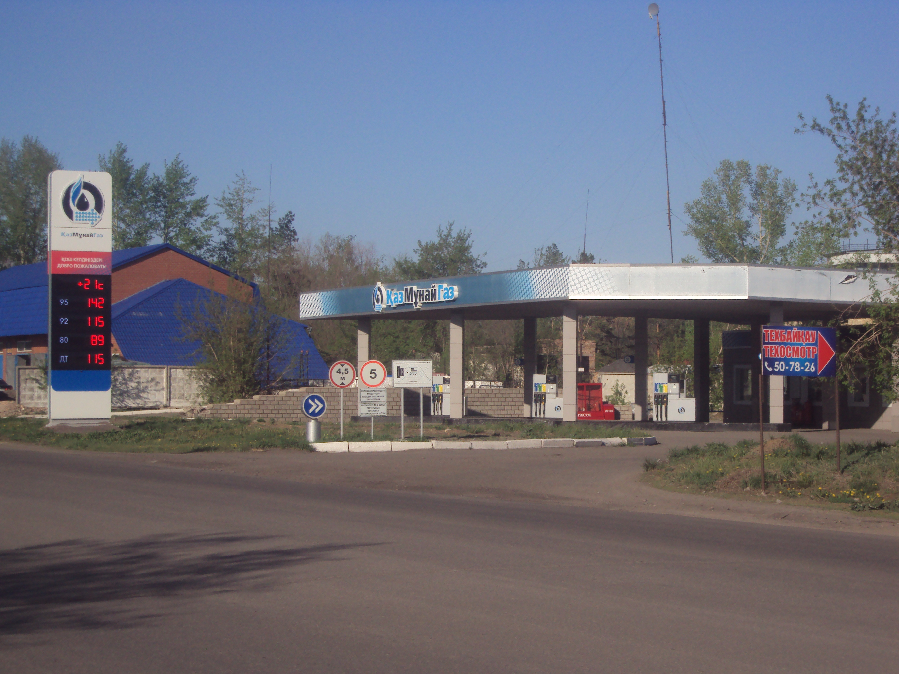 Вот такие цены на топливо в нефтяной державе Казахстан. АЗС (заправка) национальной нефтяной компании «КазМунайГаз» по улице Гудермесской города Караганды